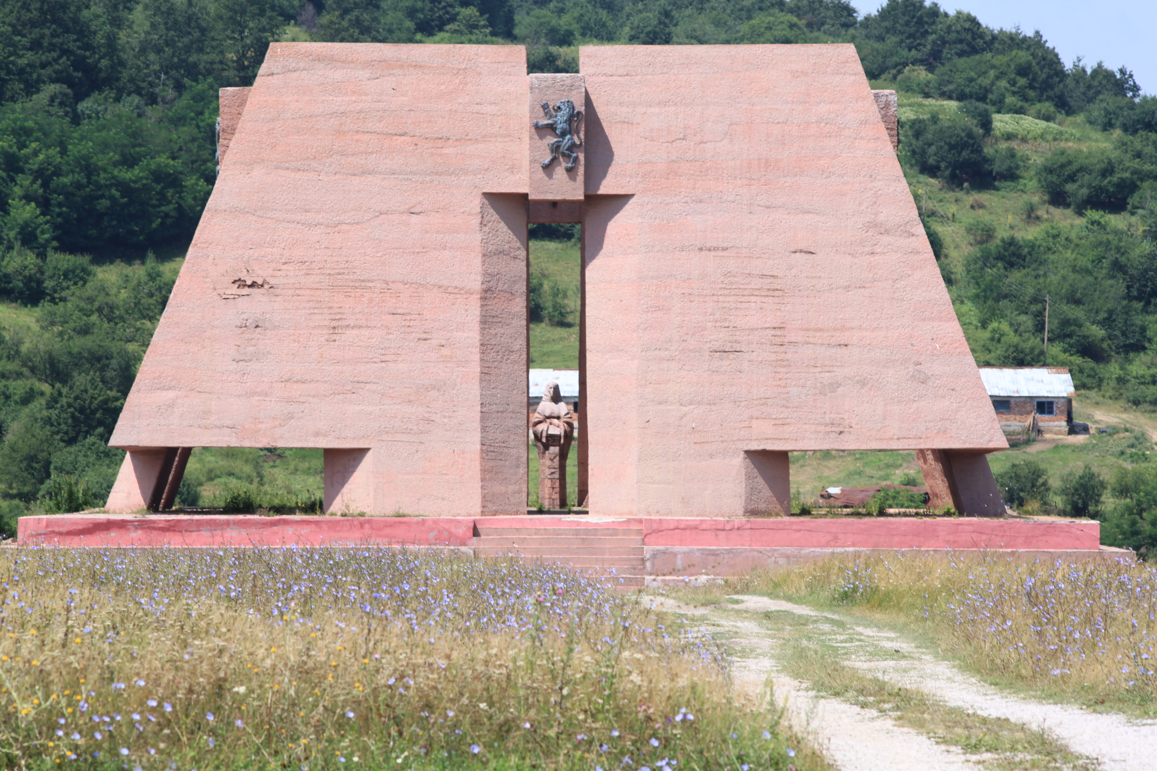 Монумента на загиналите в Сръбско-българската война 1885-с. Гургулят.